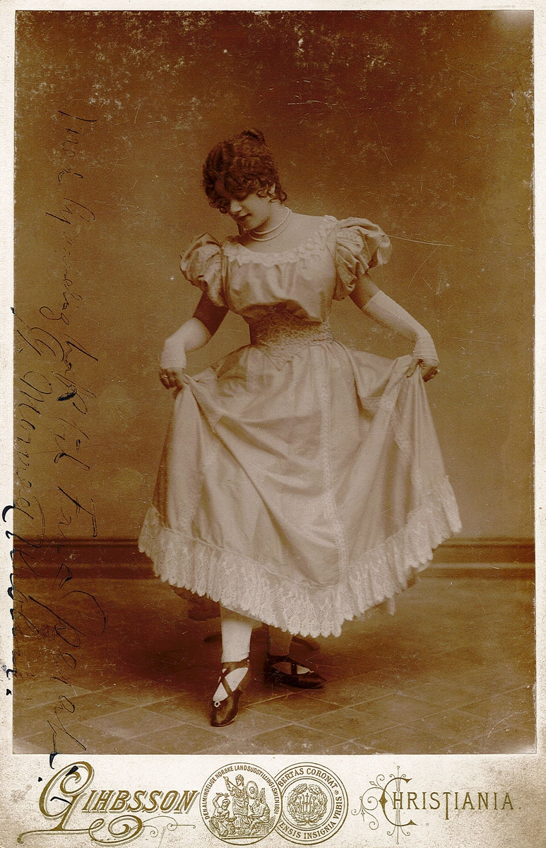 Rollebilde av Gyda Christensen, portrett, kvinne, skuespillerinne, rollebilde, stående helfigur.